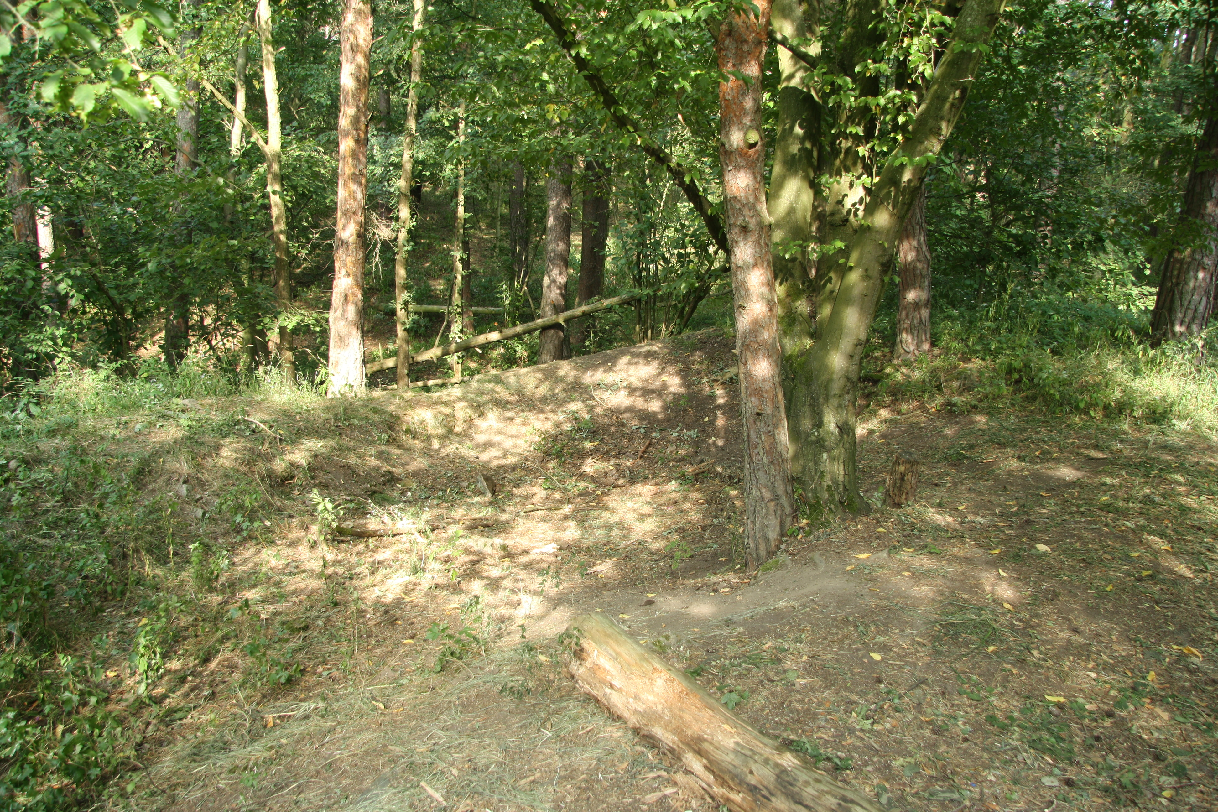 Pohled na horní část hradiště Pulkov u Radkovic u Hrotovic, okr. Třebíč.